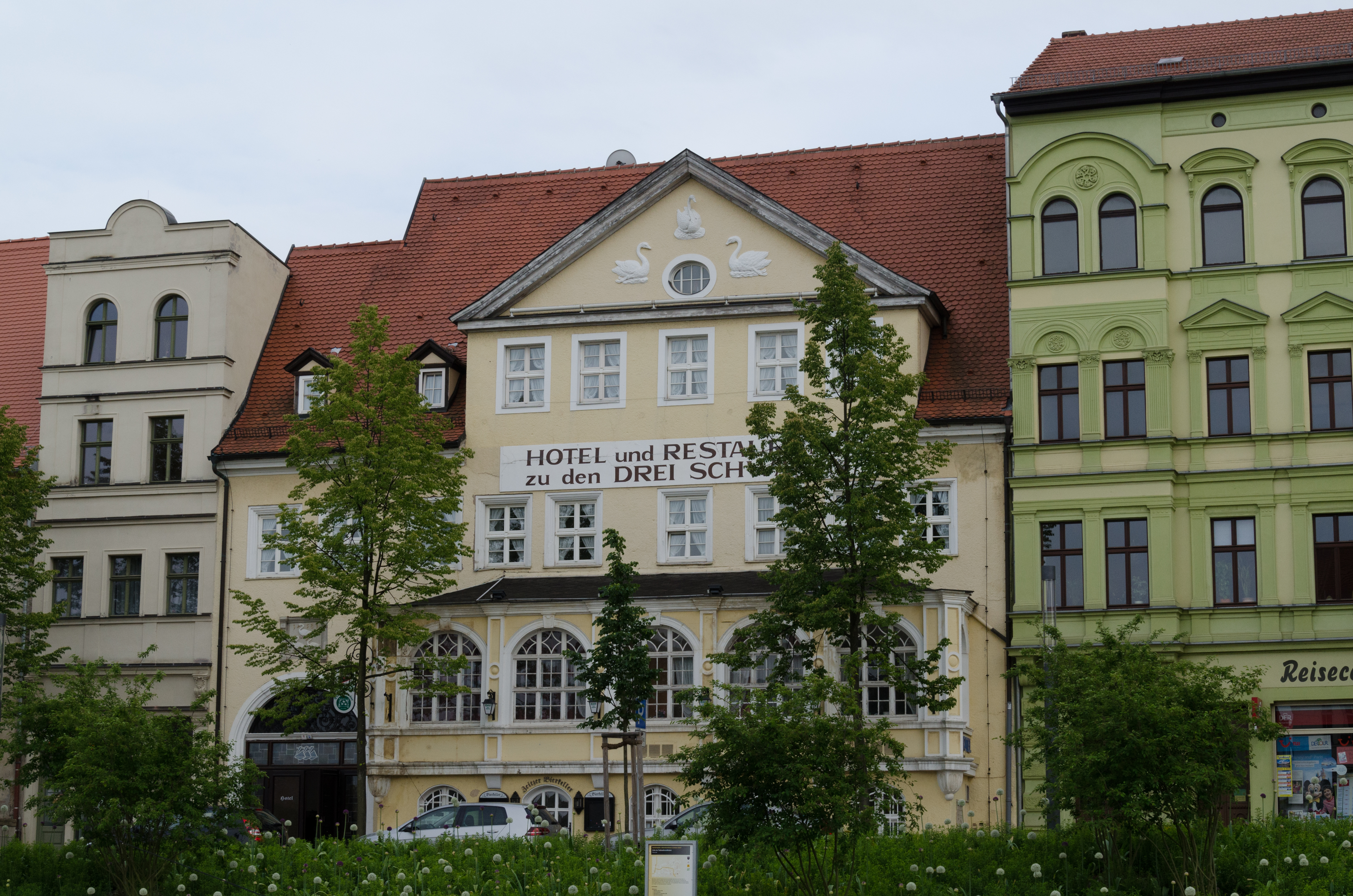 Zeitz, Altmarkt 6